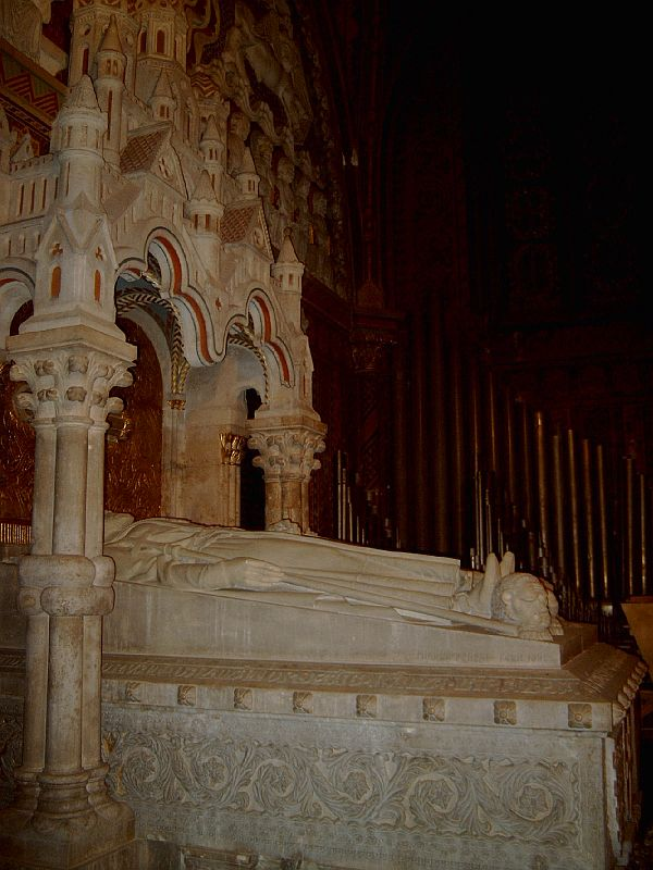 III. Béla magyar király és feleségének Antiochiai (Chatillon) Annának sírja Budapesten, a Nagyboldogasszony (Mátyás) templomban, (I. Szentháromság tér)